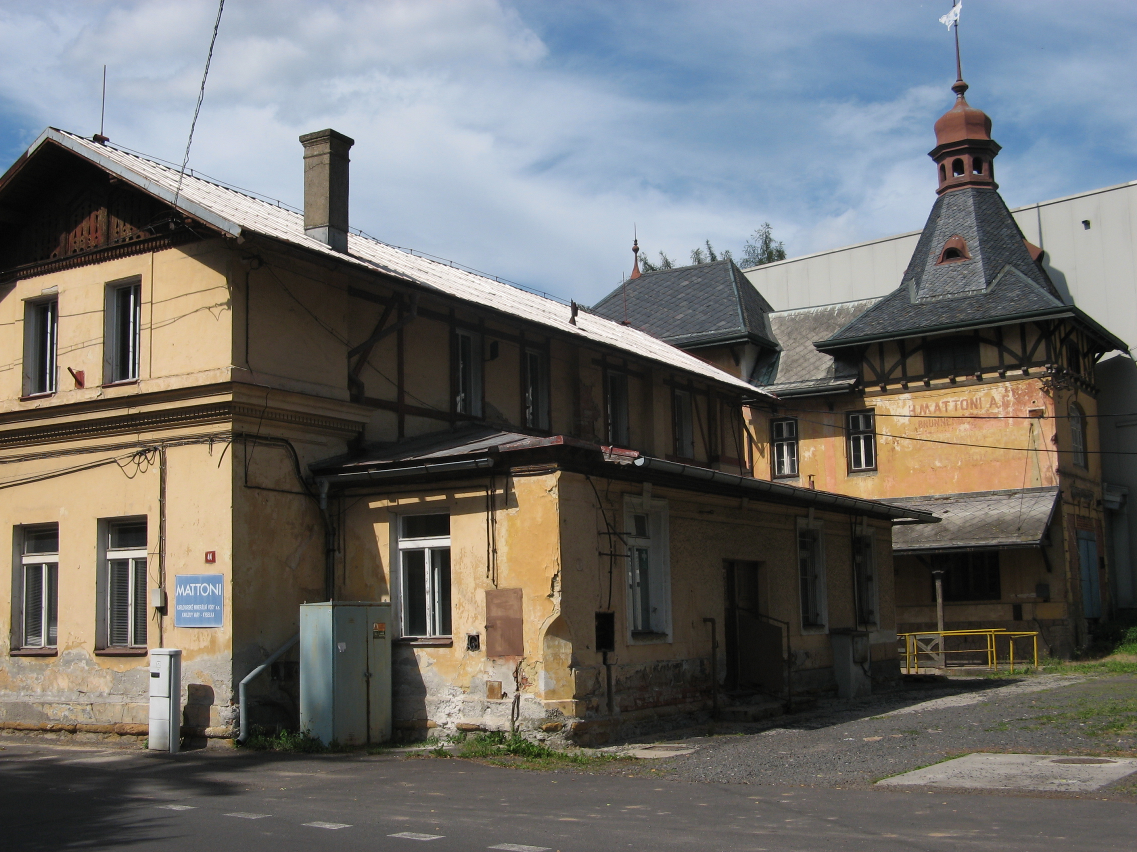 Budova Mattoni, č.p. 44 v obci Kyselka v okrese Karlovy Vary